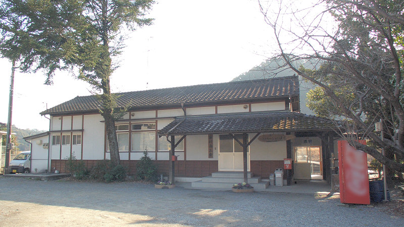 JR肥薩線渡駅 駅舎 撮影者/著者/著作権保有者 : MK Products (本人がアップロード) 撮影日 : 2007/02/24 渡駅用にアップロードした画像です。良い画像があれば別の画像に変えてください。